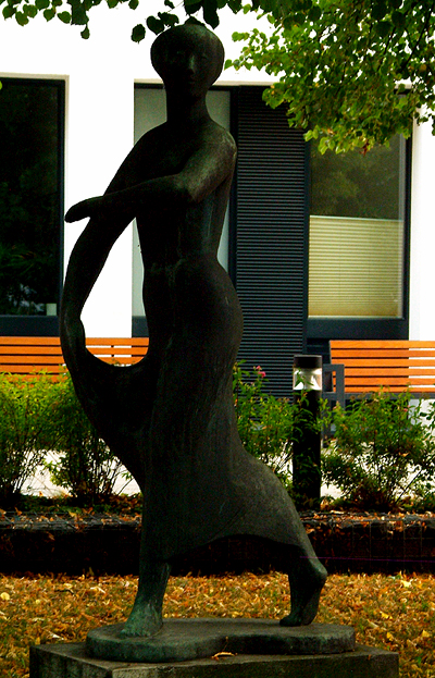 Herbert Volwahsens Skulptur Tanzende wurde 1969 in den Aussenanlagen des Heinemanhofes aufgestellt ...